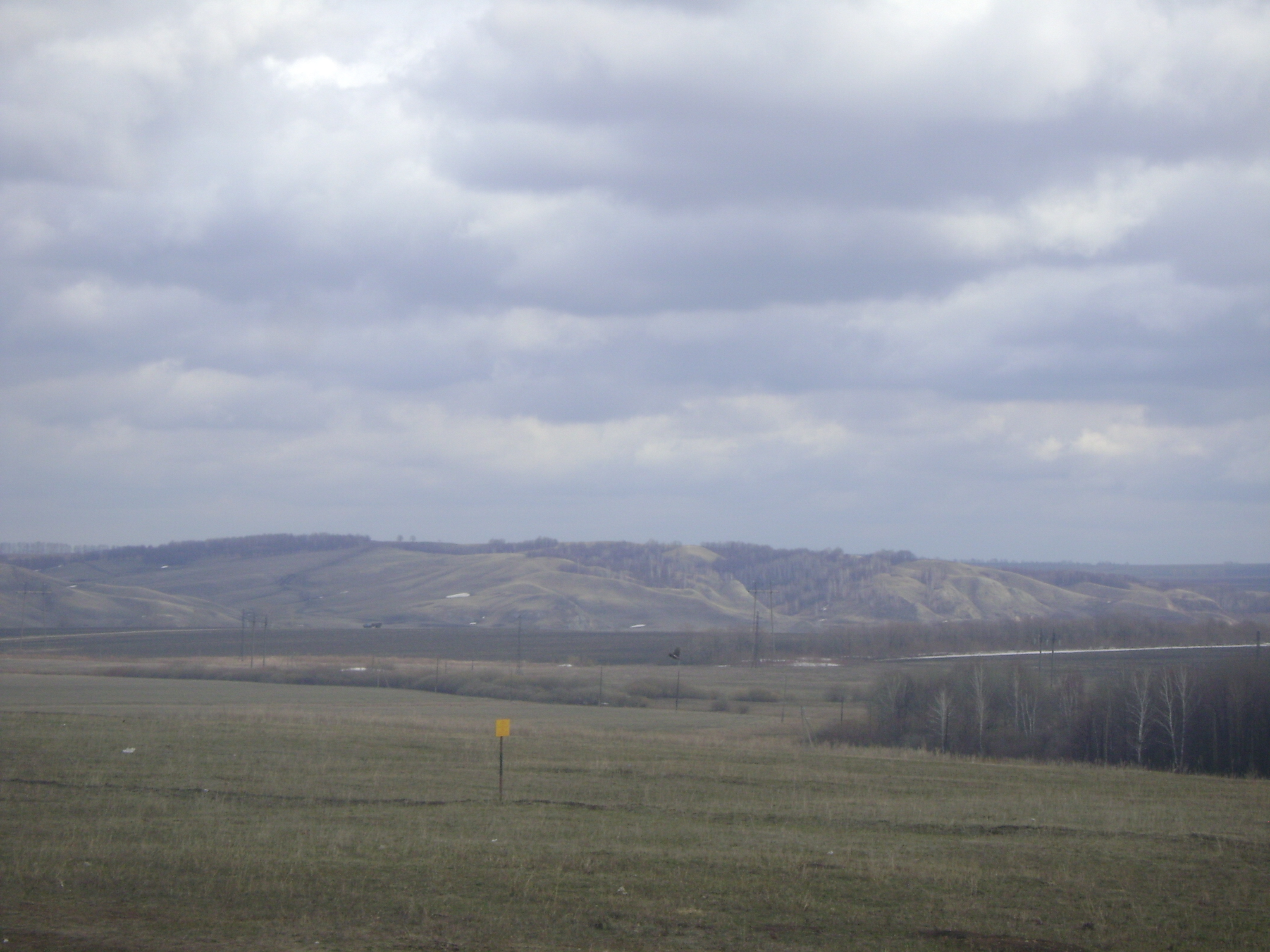 Вид на запруду на р.Узень и д. Исмагилово (Аургазинский район) со обратной стороны д. Арсланово